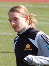 Nia Künzer